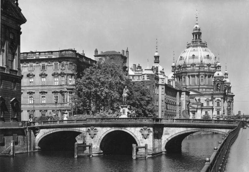 Berlin; Kurfürstenbrücke, Schloss und Dom ca. 1936